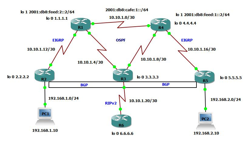 Монгол: Энэ топологи дээр баталгаажуулалт хийх бүх протоколыг ашигласан байна.